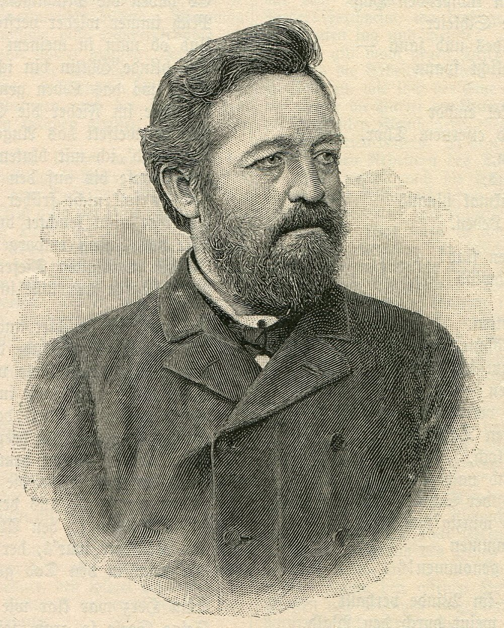 Holzschnitt von Paul Grottkau